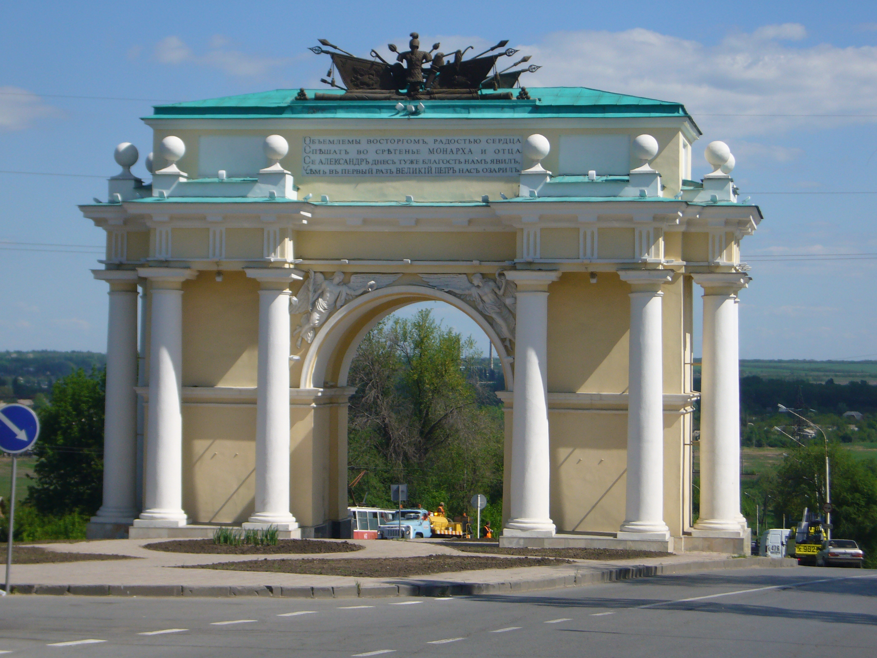 Einewr der beiden Triumphbogen in Nowotscherkassk von 1814